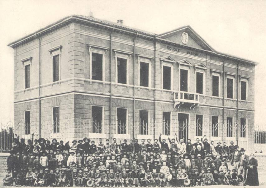 inaugurazione nuove scuole di Pescantina (provincia di Verona), 8 settembre 1904